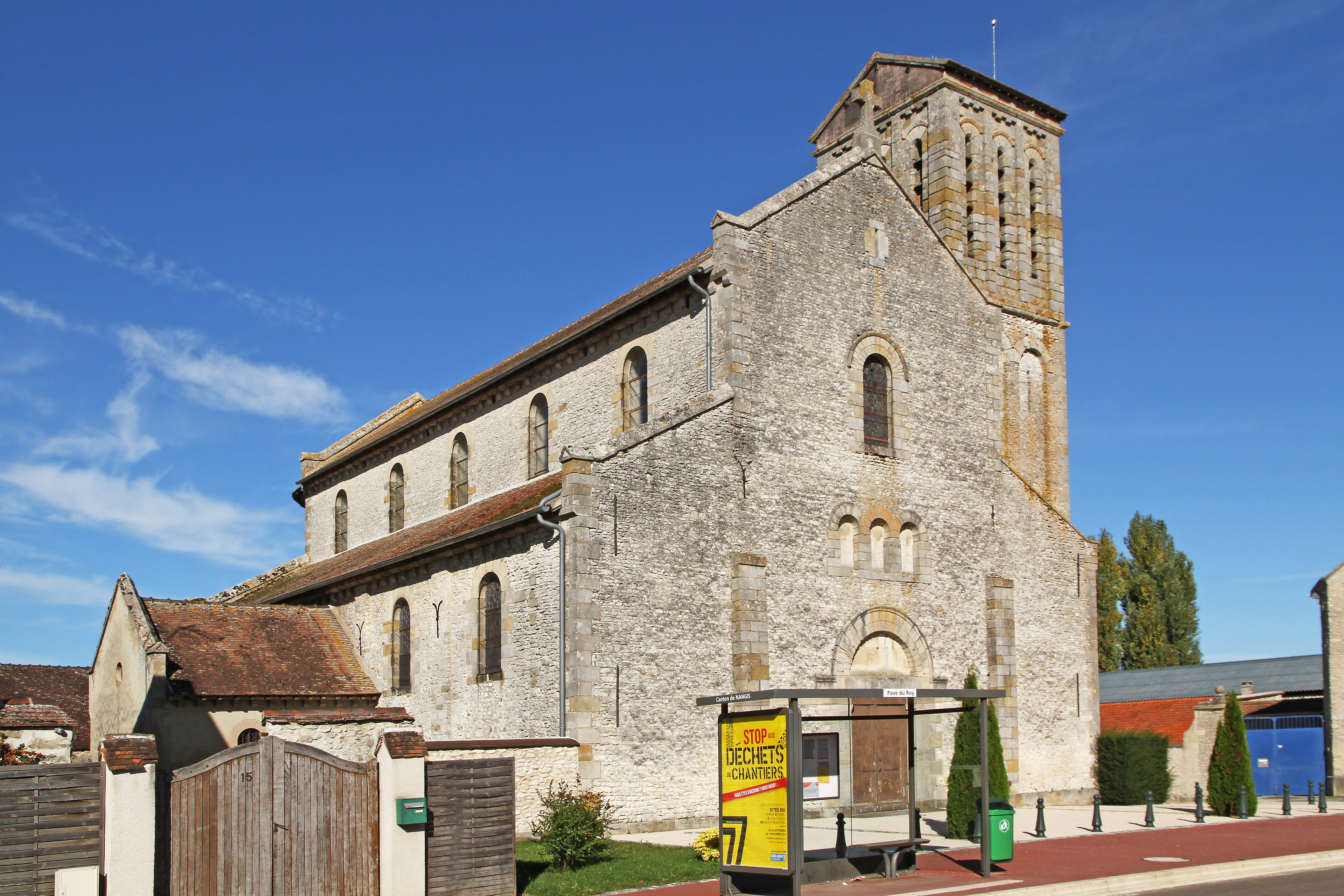 Église Saint-Augustin de Maison-Rouge